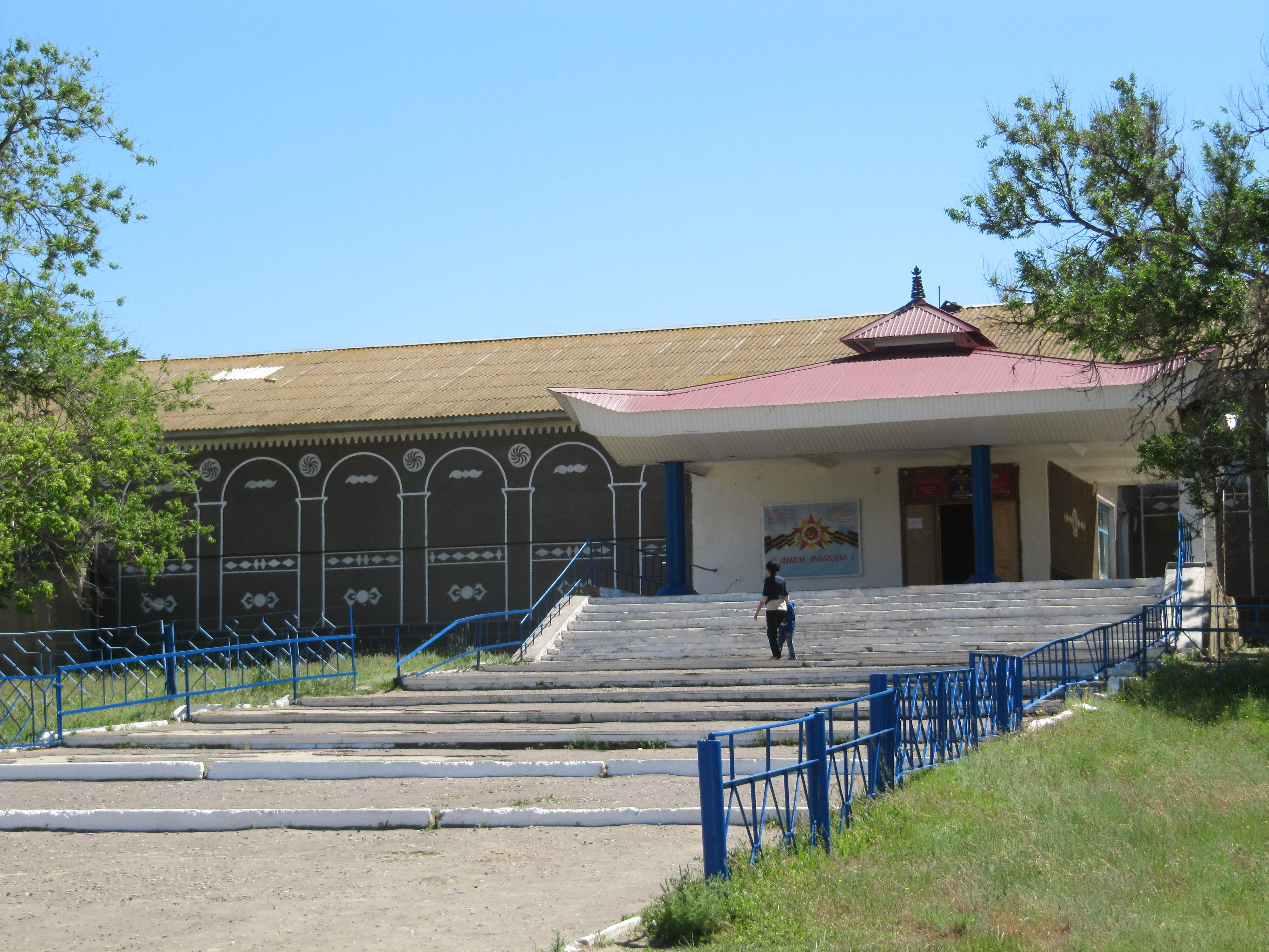 Сельский дом культуры и библиотека в Троицком, Калмыкия